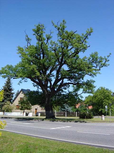 Alte Eiche im Gommerner Ortsteil Wahlitz